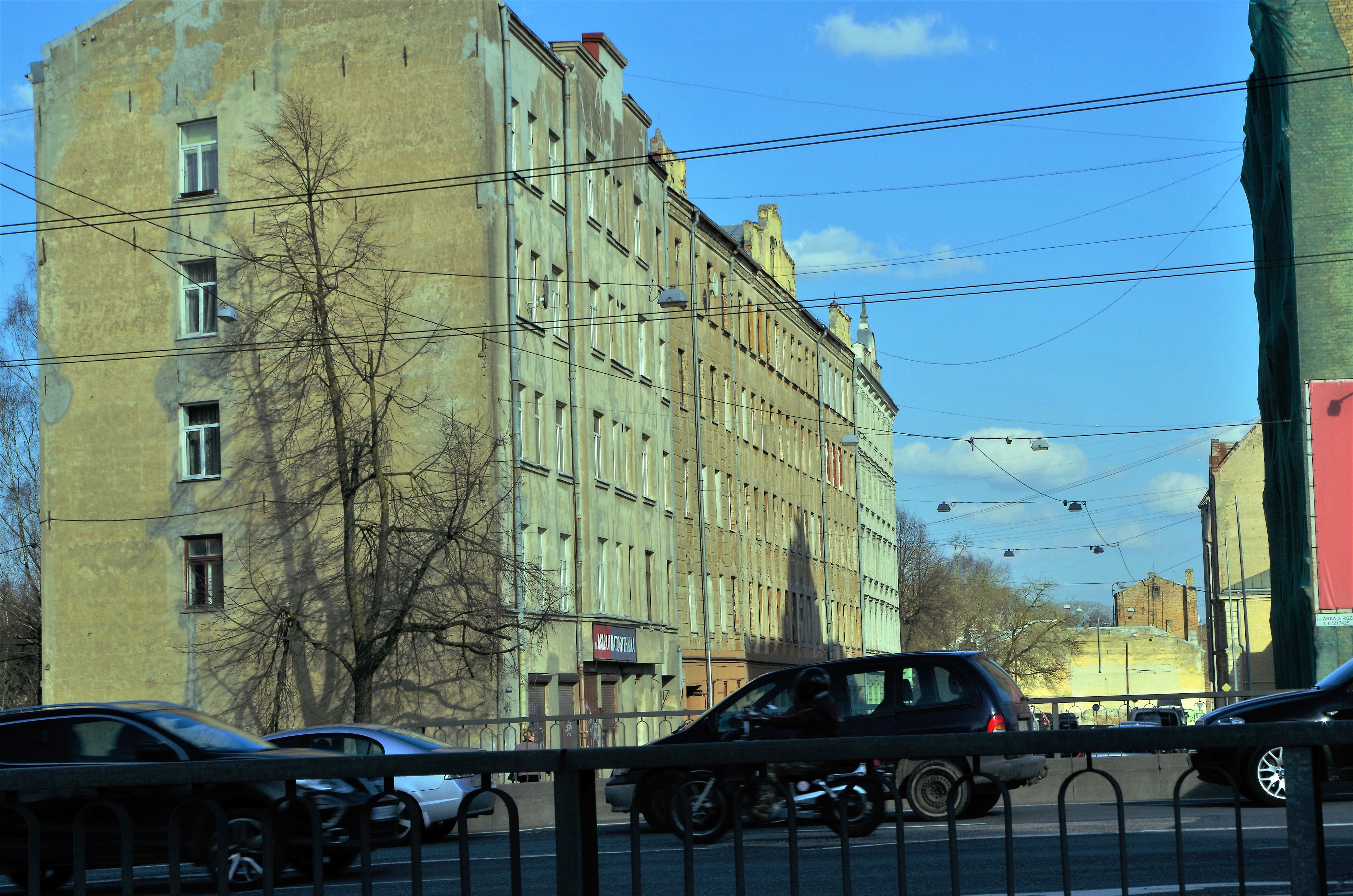 Wohnhaus aus der Stalinzeit in der Maskavas iela